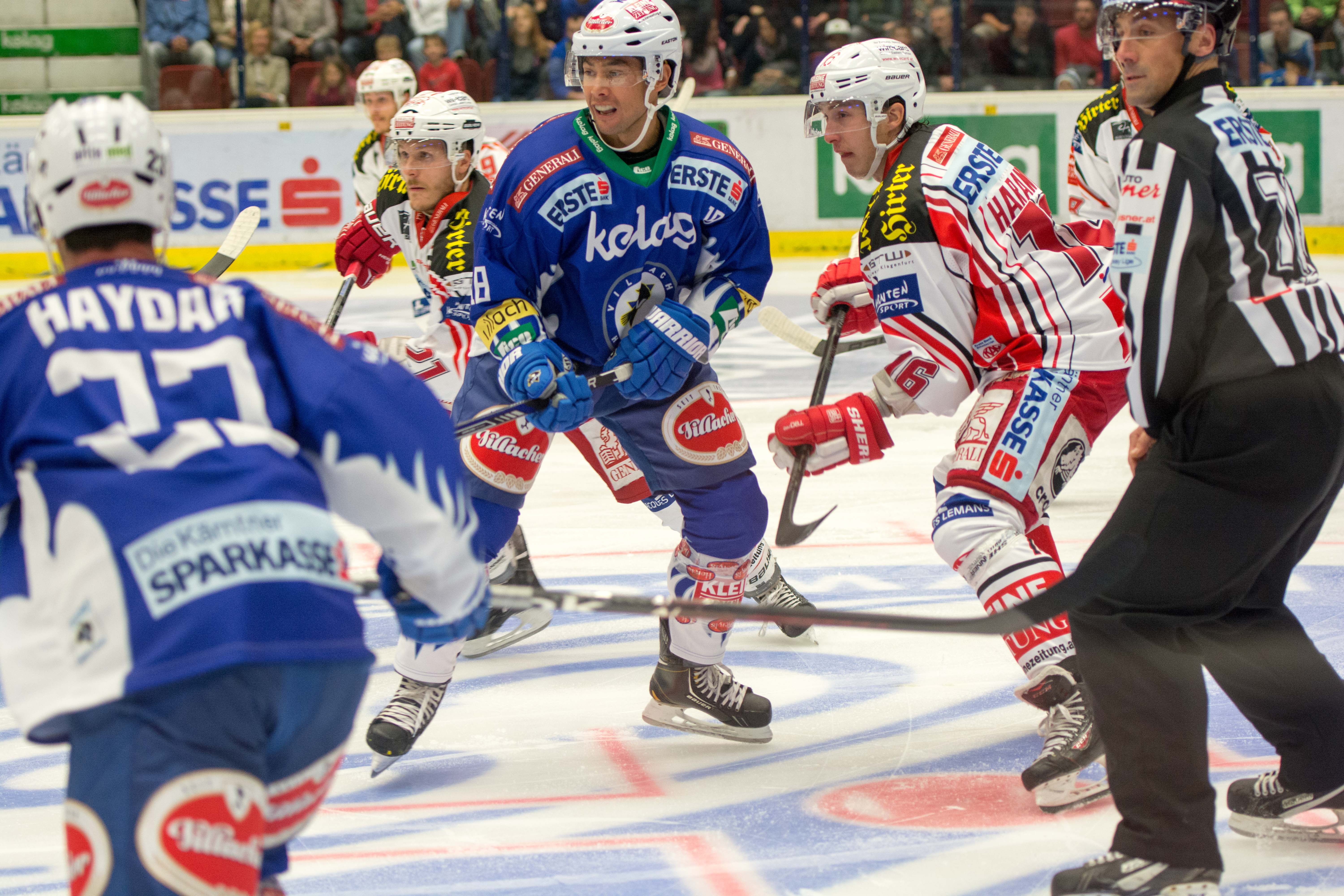 12.10.2014, Stadthalle Villach, AUT,EBEL,EC VSV vs. EC KAC im Bild Jason Krog, (EC VSV, #18),Patrick HARAND, (EC KAC,#16)